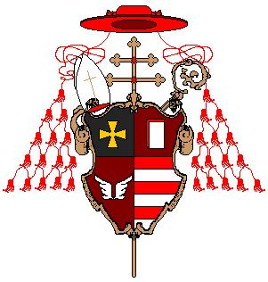 Stemma del Cardinale Giovanni Battista Caprara dei conti di Montecuccoli, Arcivescovo di Milano.